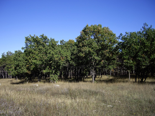 Дубки - остатки реликтовых лесов предгорья Крыма